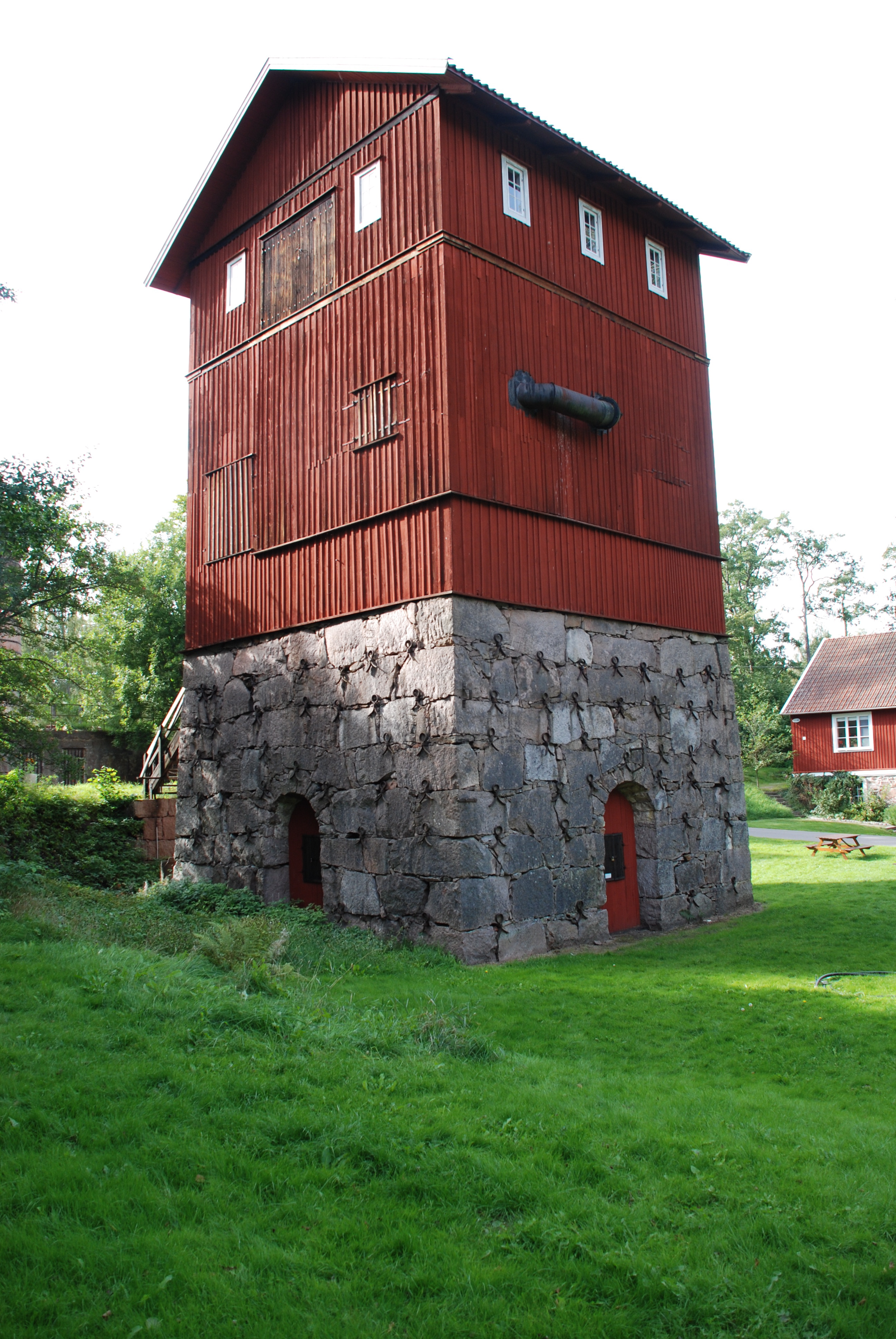 Masugnen i Åryd